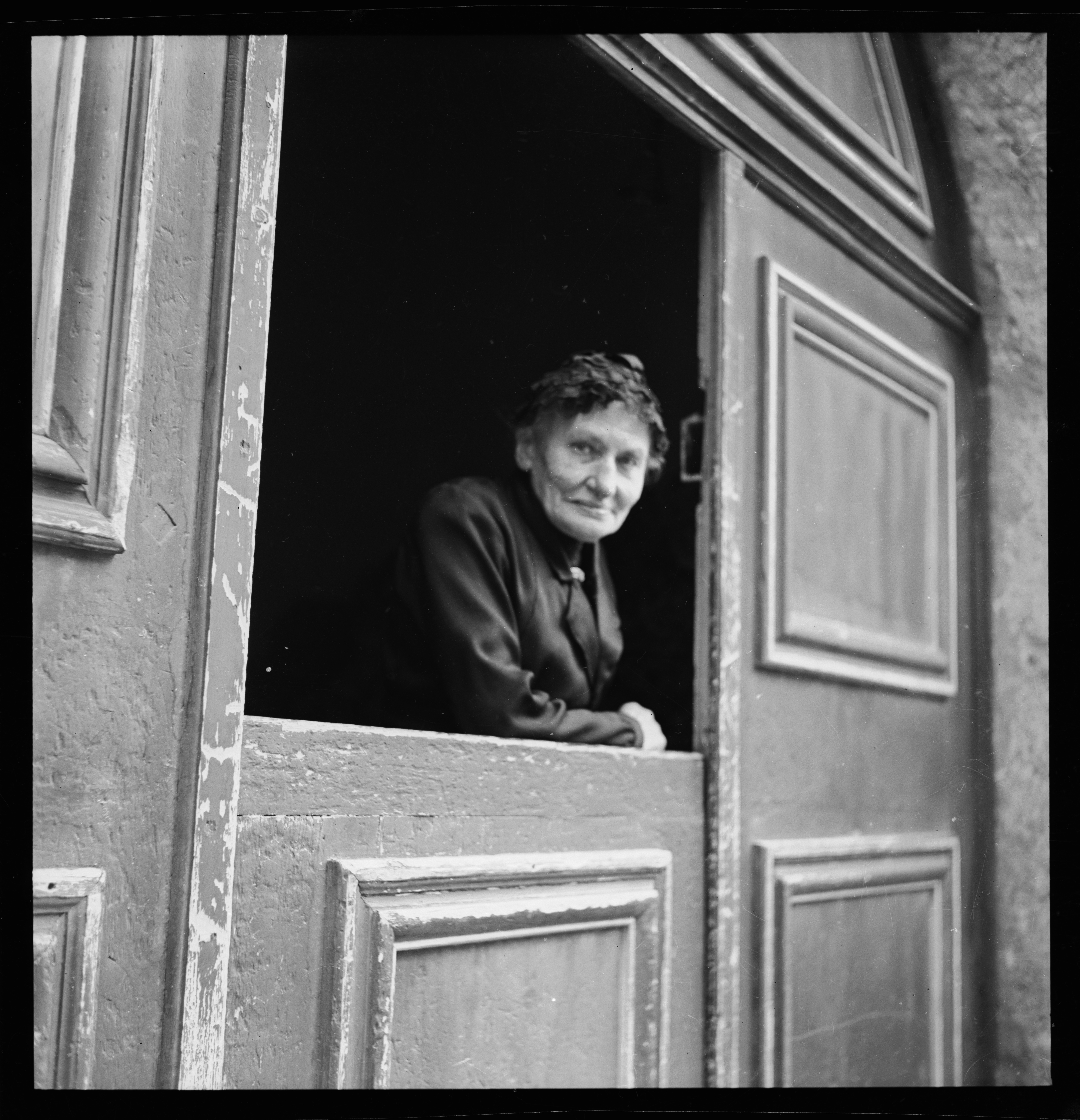 Schweiz, Zuoz: Menschen; Clementina Gilli (Schriftstellerin) in ihrem Haus; Zuoz